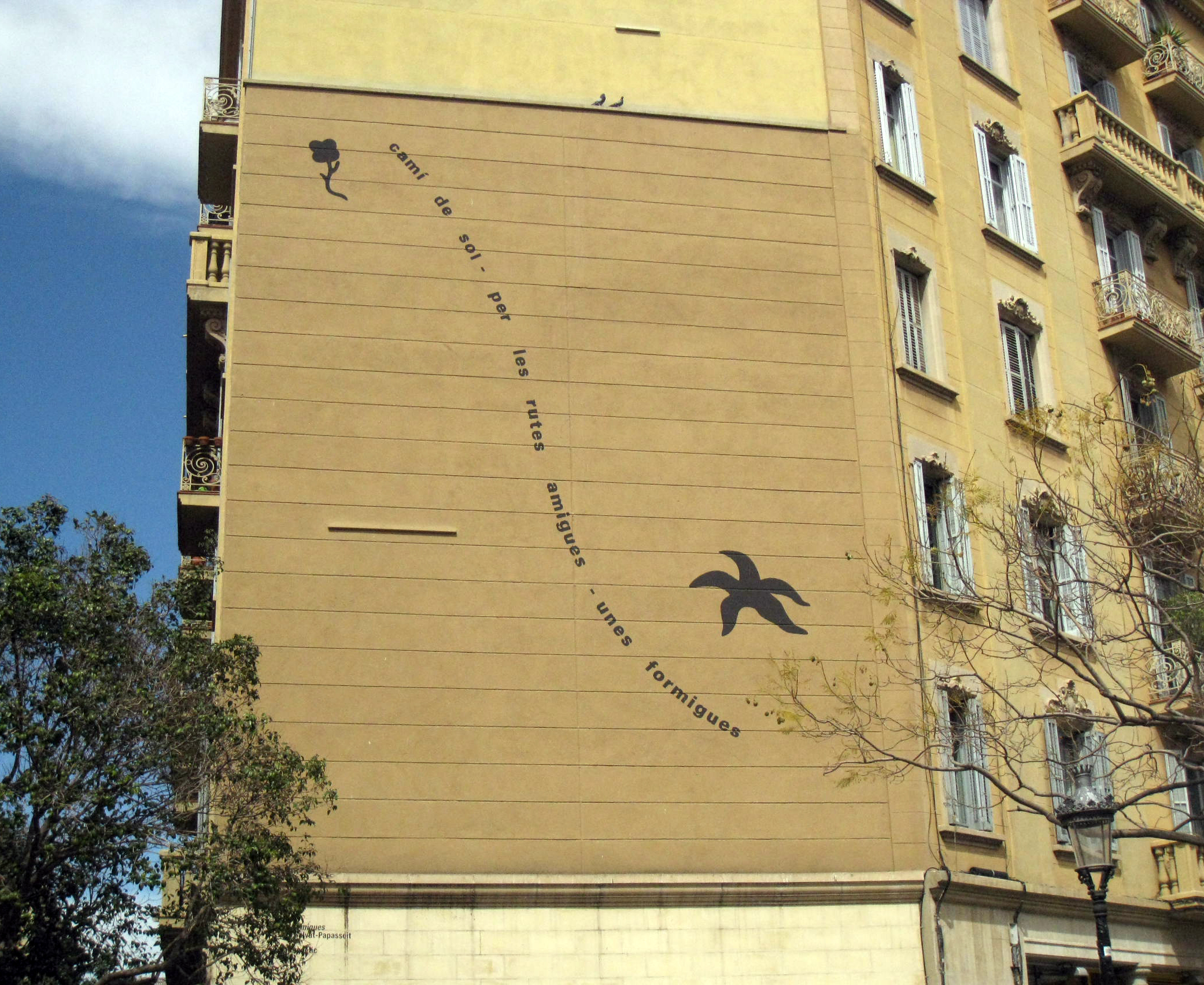 Les formigues (José Manuel Pinillo). Pg. del Born amb c. Rec (Barcelona)